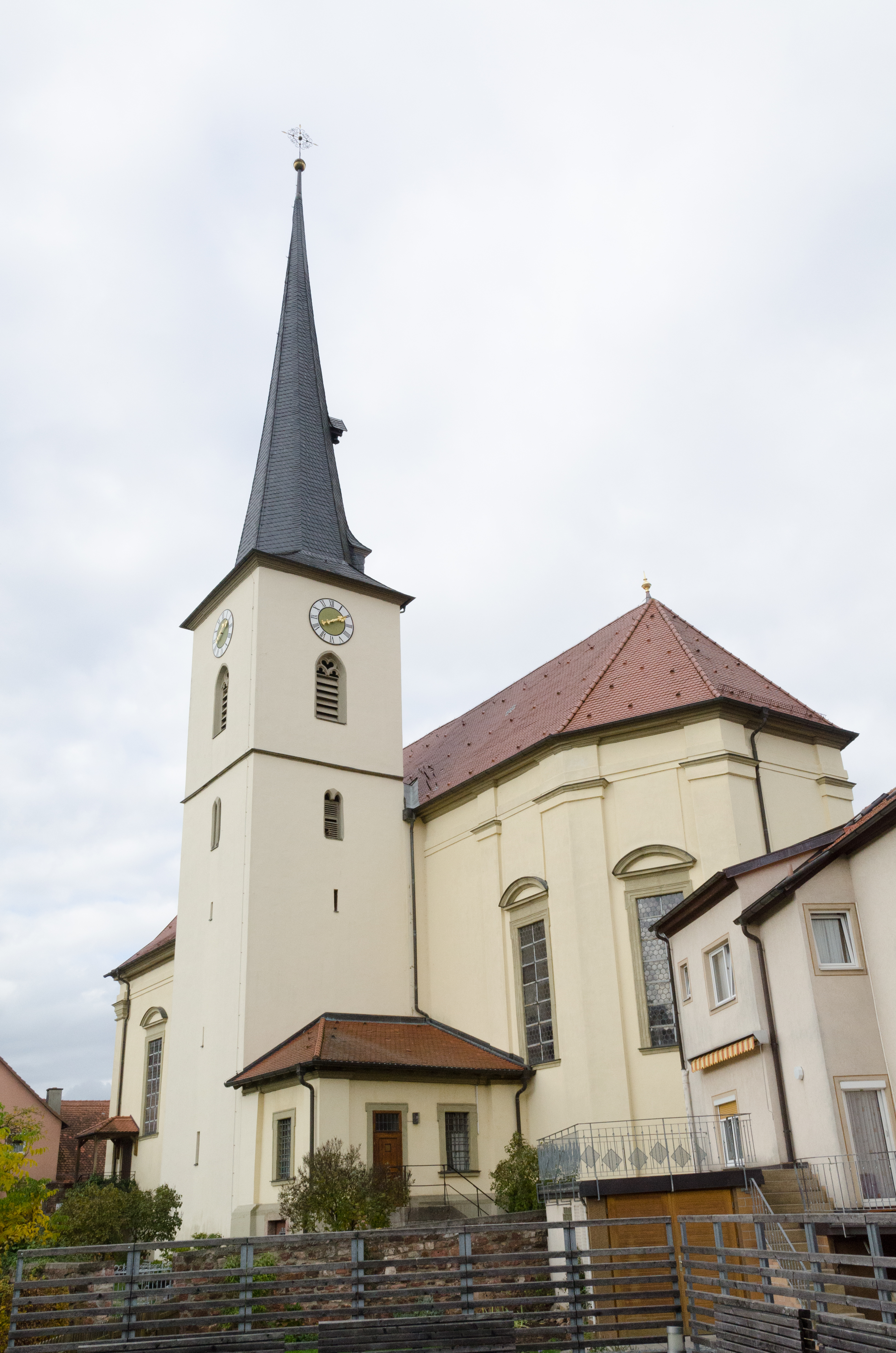 Burkardroth, St. Petrus in Ketten, Exterio